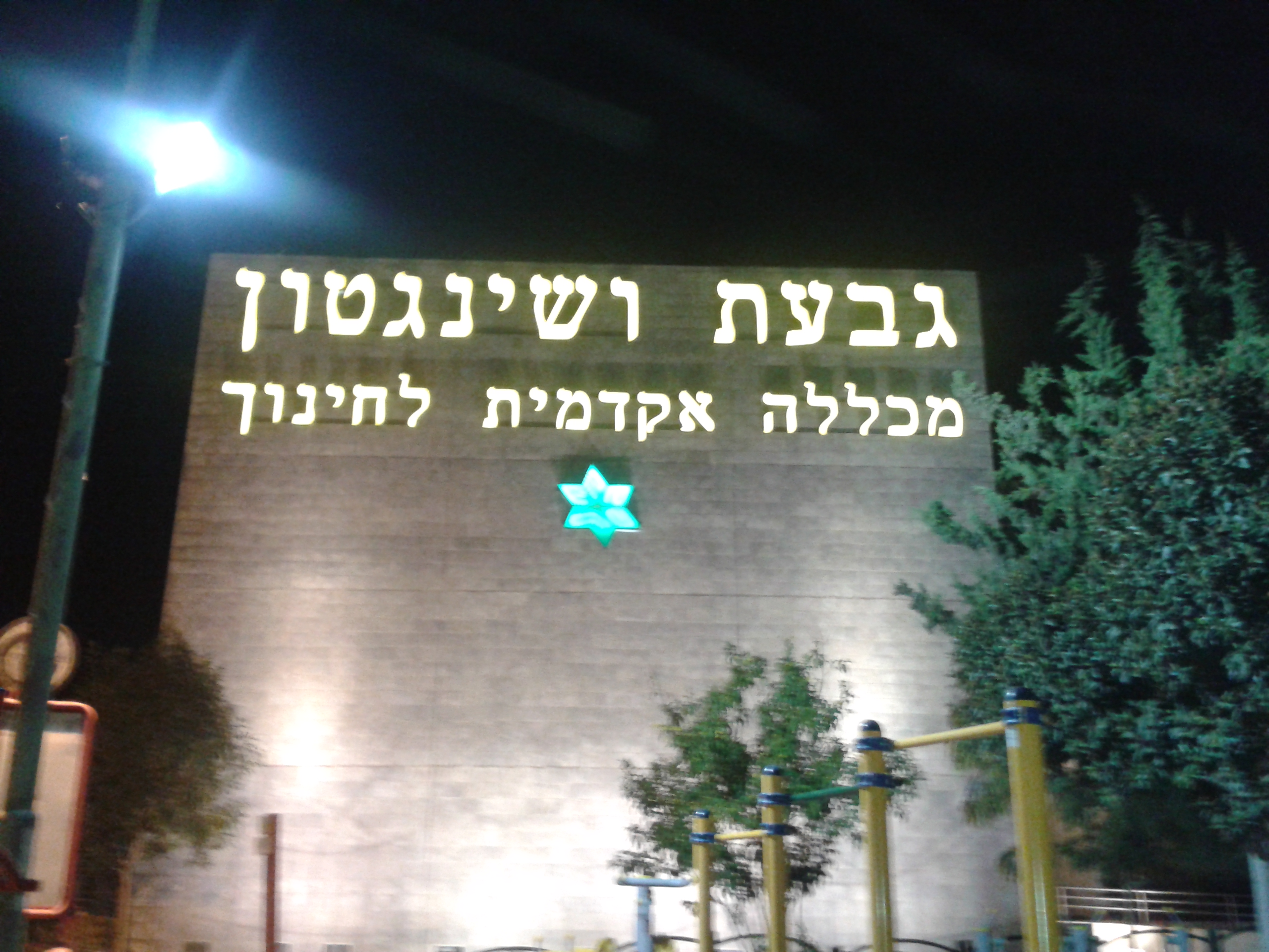 גבעת וושינגטון